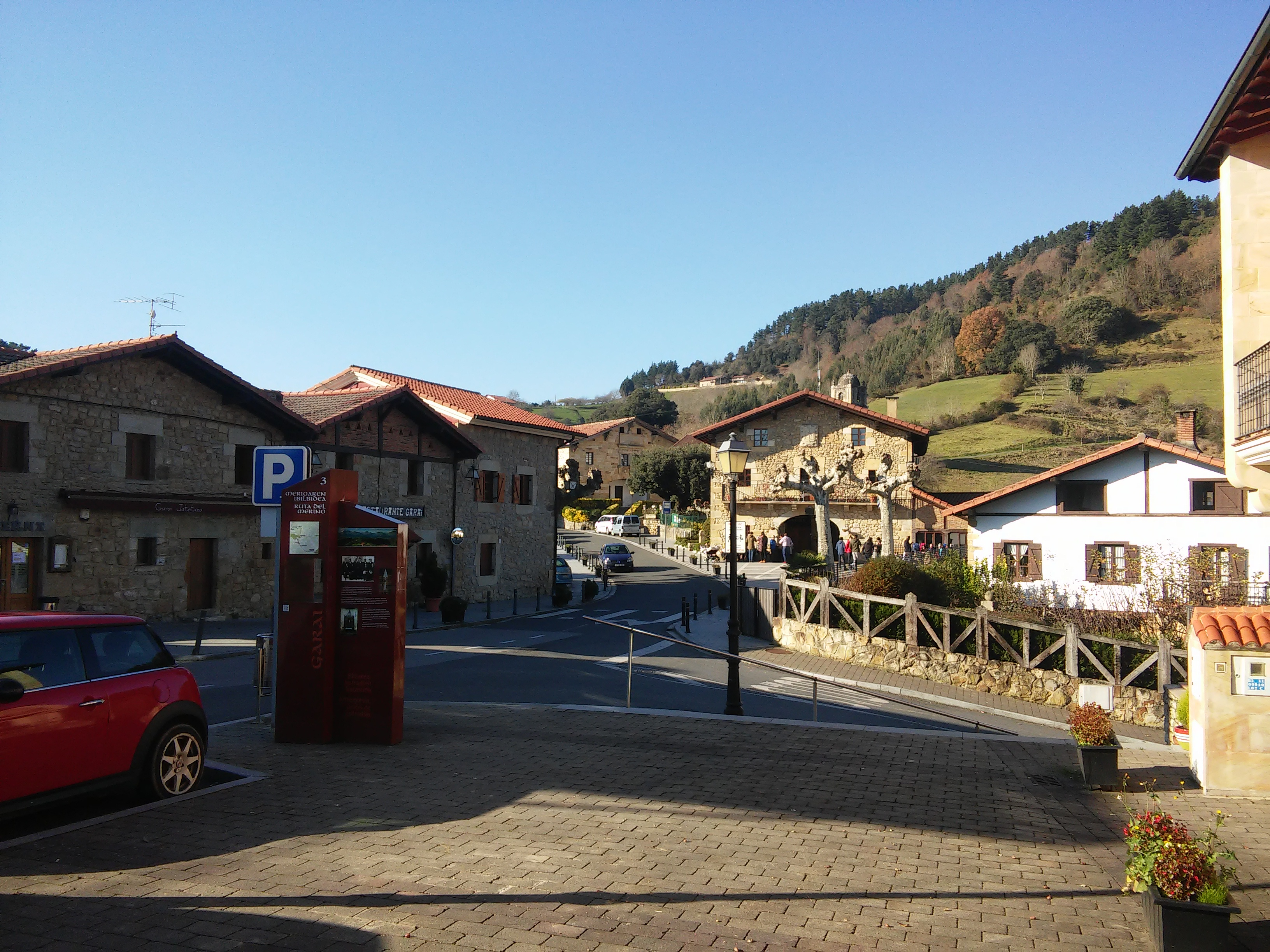 Garai herriko (Bizkaia) kale nagusia